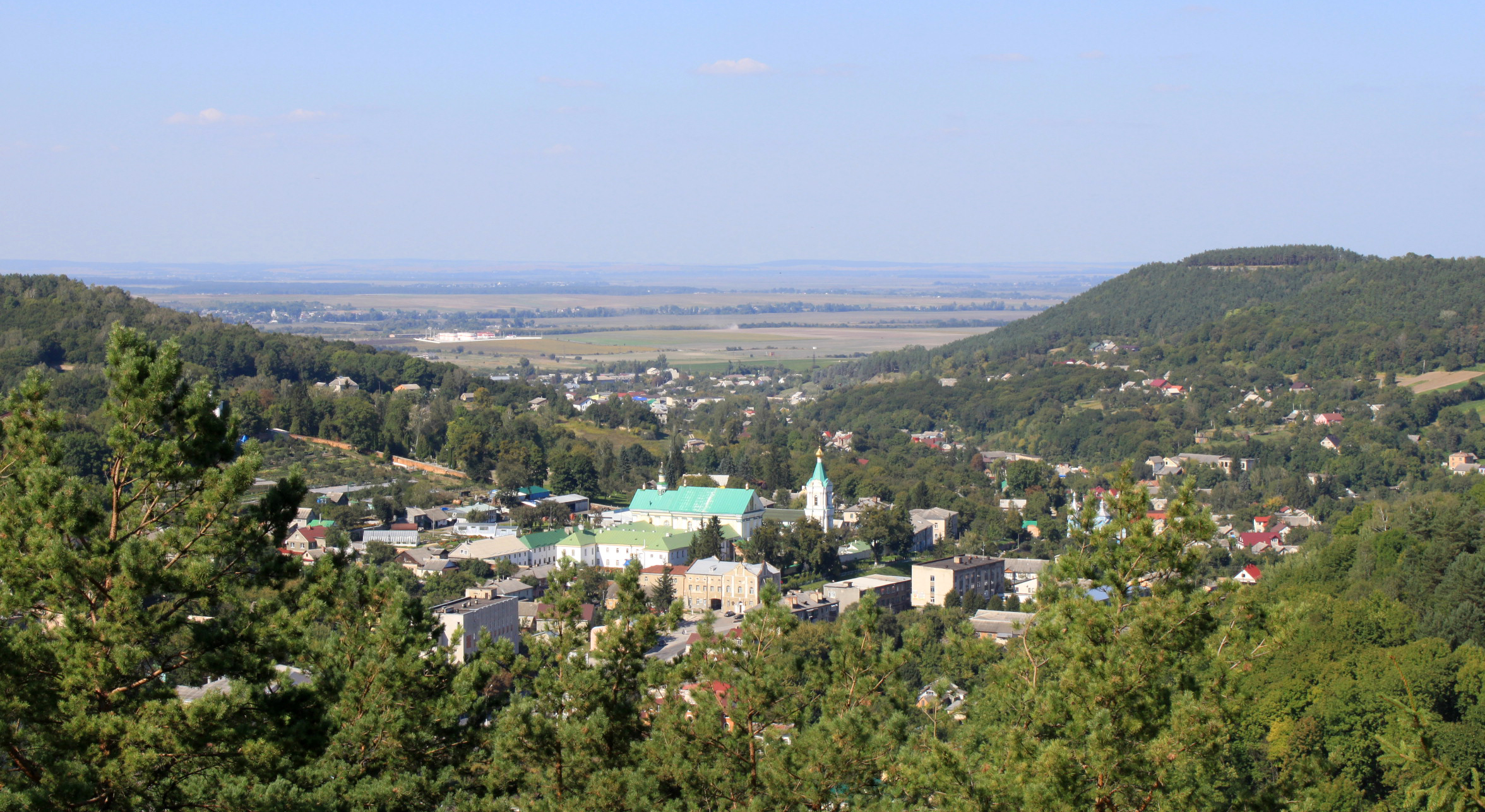 Богоявленський монастир, Кременець, вул. Шевченка, 90